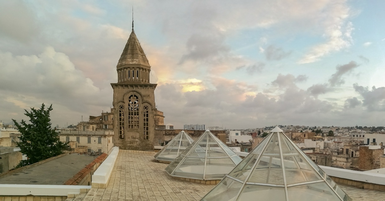 Presbytère Sainte Croix nouvellement réhabilité à La Médina de Tunis